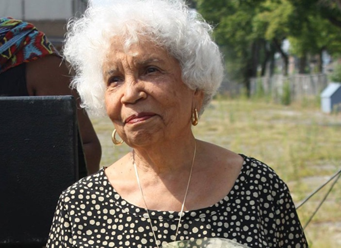 Adeline Chancy